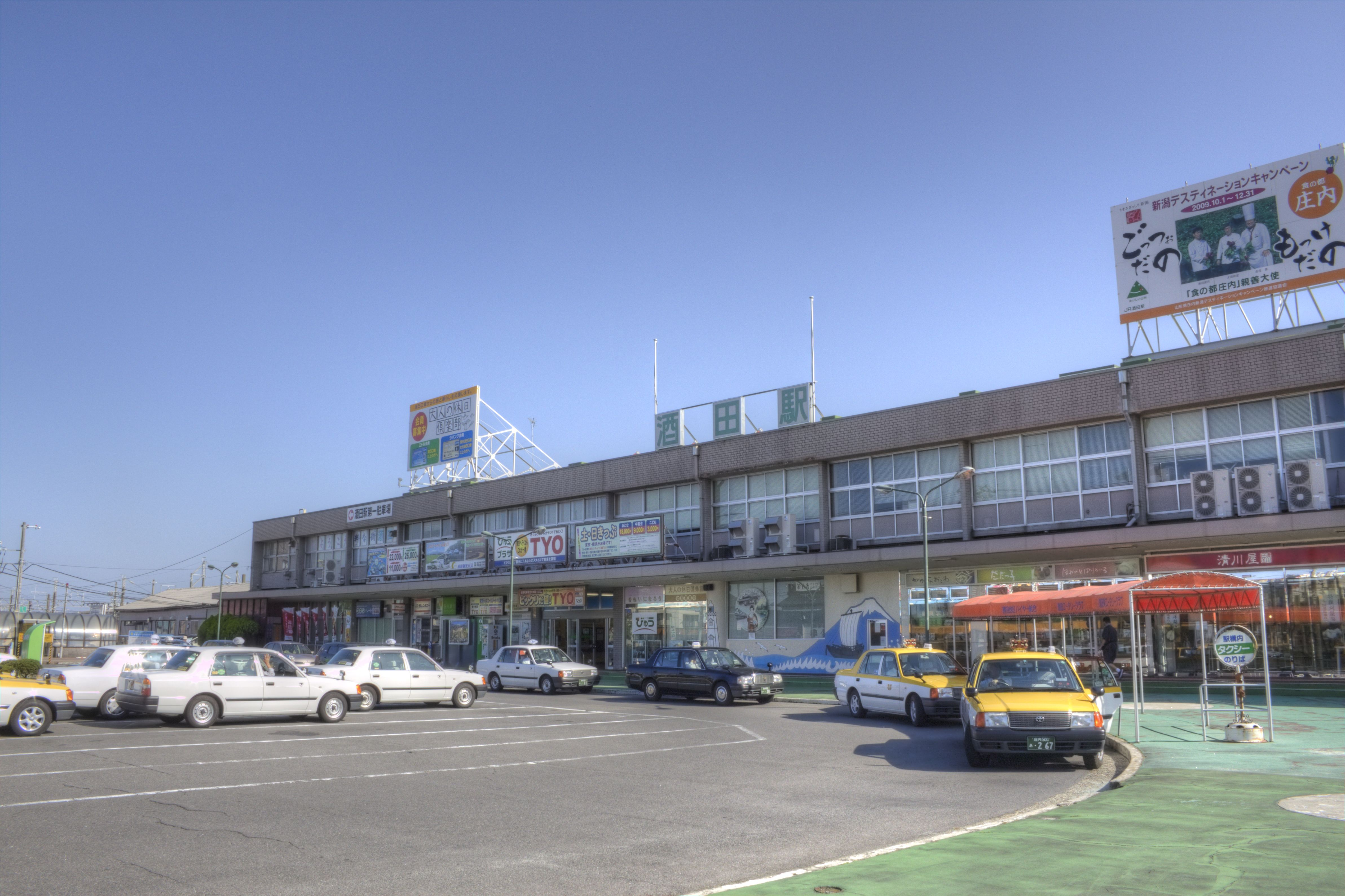 酒田駅